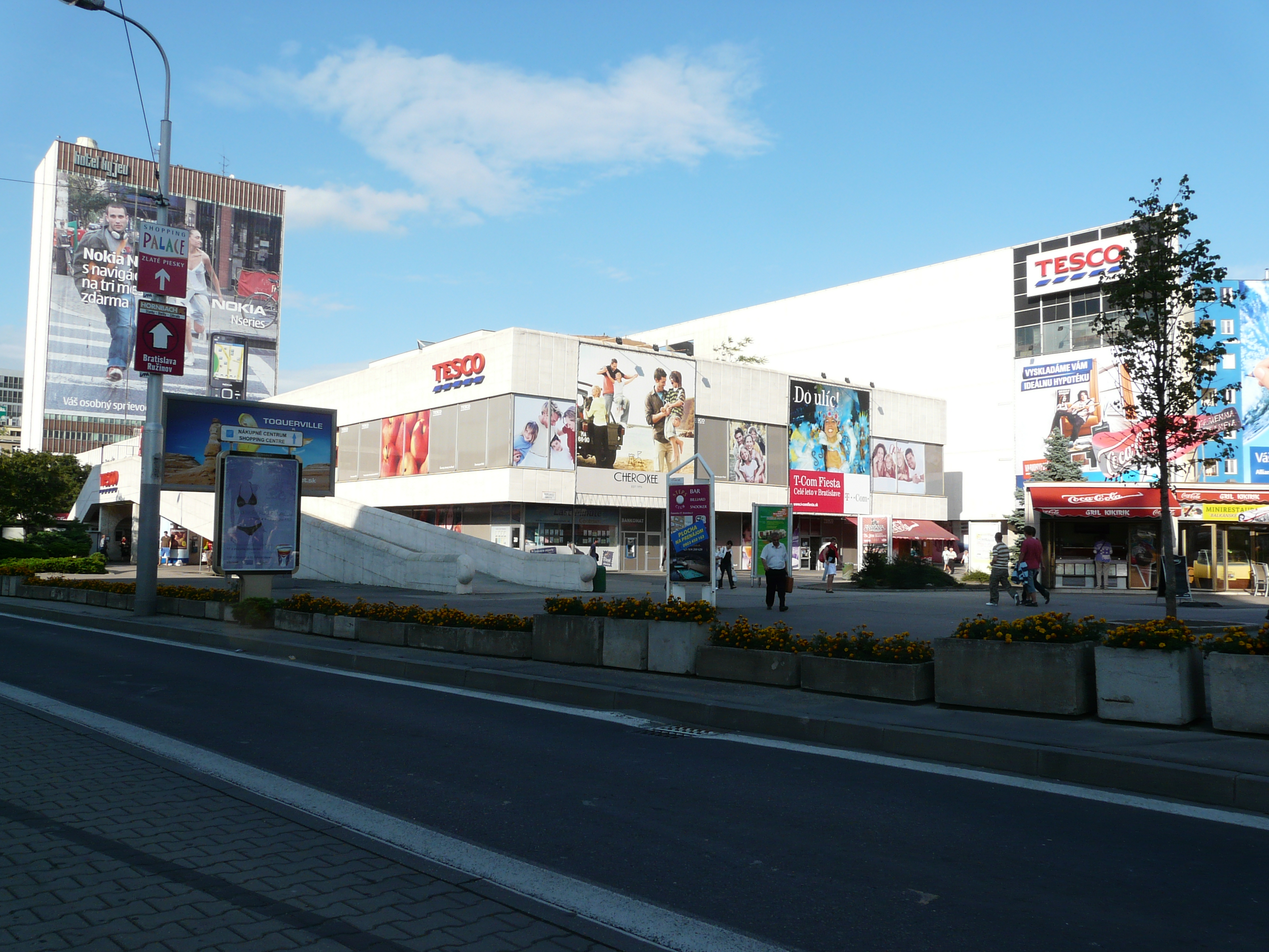 obchodny dom TESCO v Bratislave